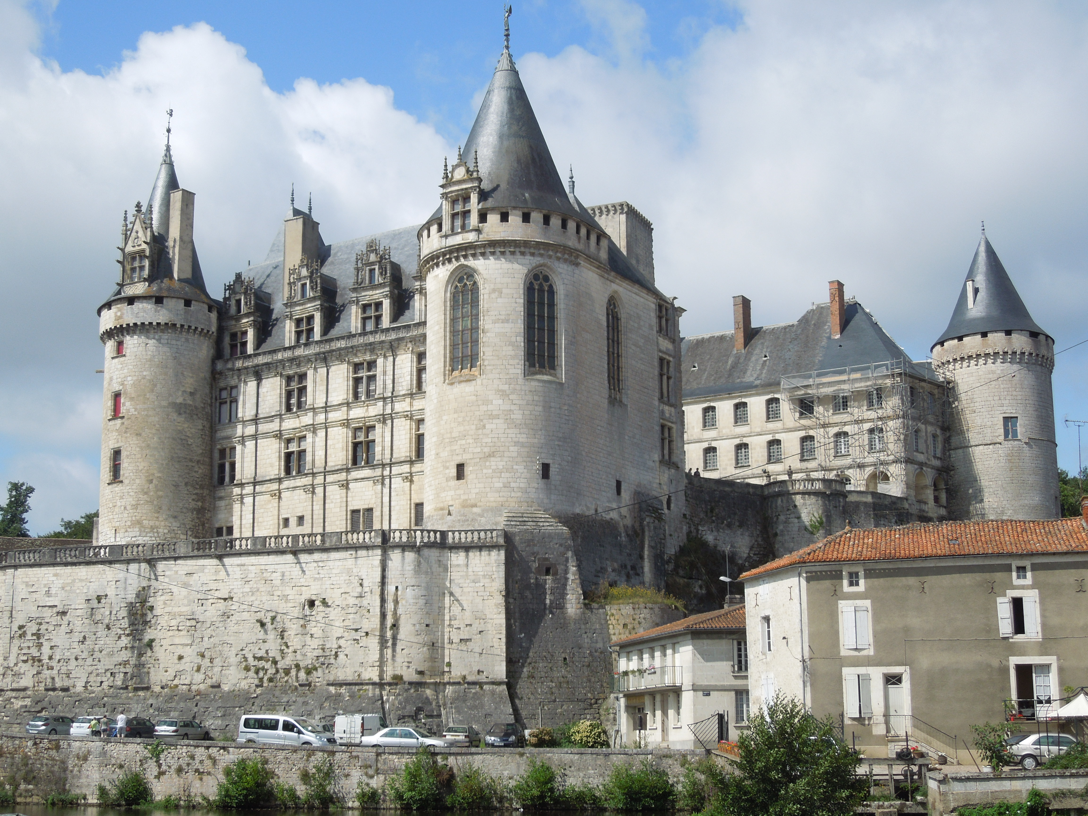 Chateau La Rochefoucauld, Gesamtansicht vom Dorf